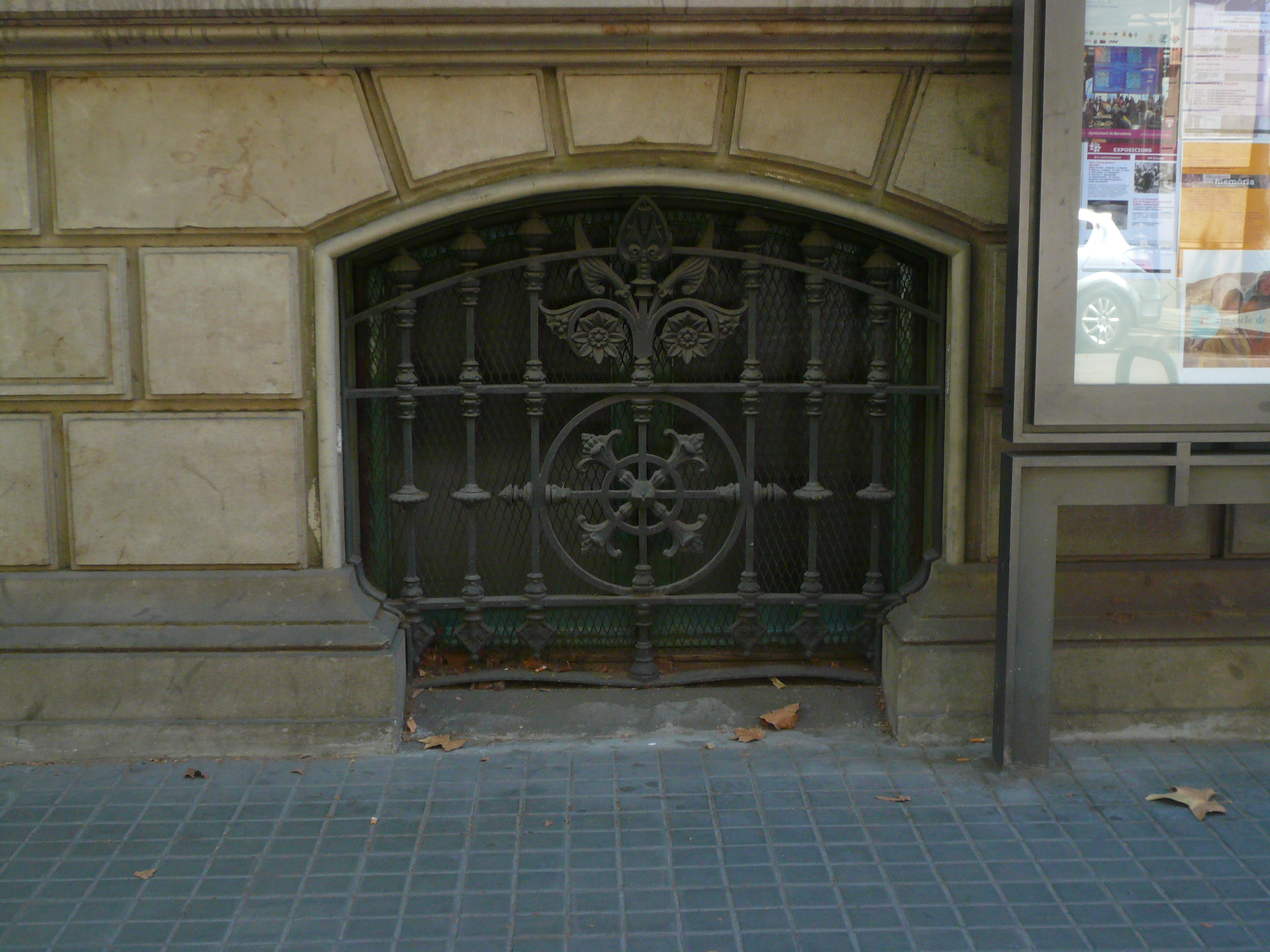 Casa Elizalde (Barcelona) Object location41° 23′ 40.21″ N, 2° 09′ 57.29″ E